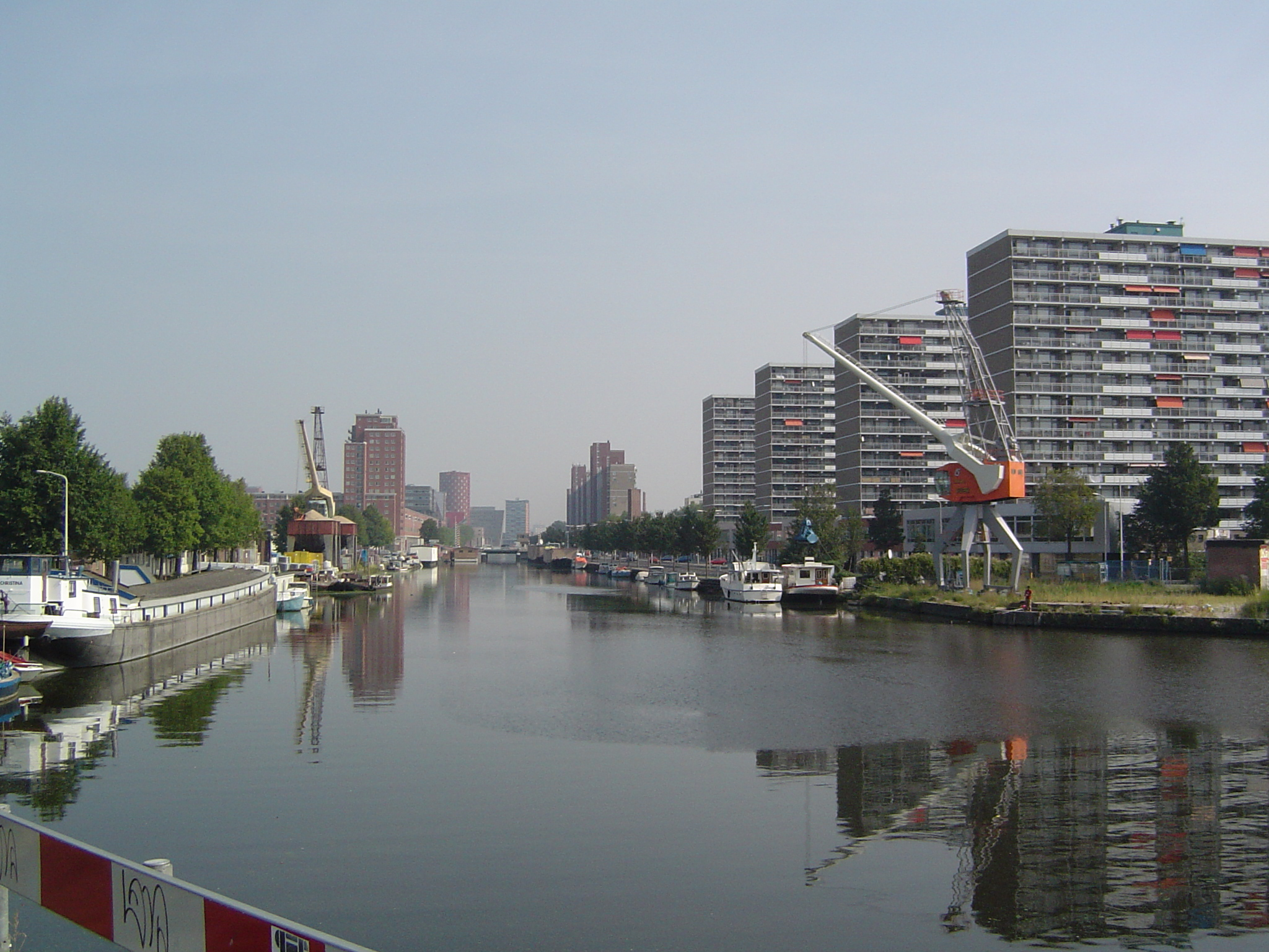 Neherkade, Den Haag, The Netherlands Made by Joris van Rooden on 05-09-2004